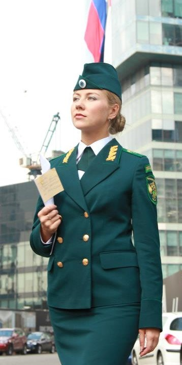 Форменная одежда служащих Росприроднадзор — на фото действительный государственный советник РФ 2 класса, Начальник Управления Соколова Наталья Романовна